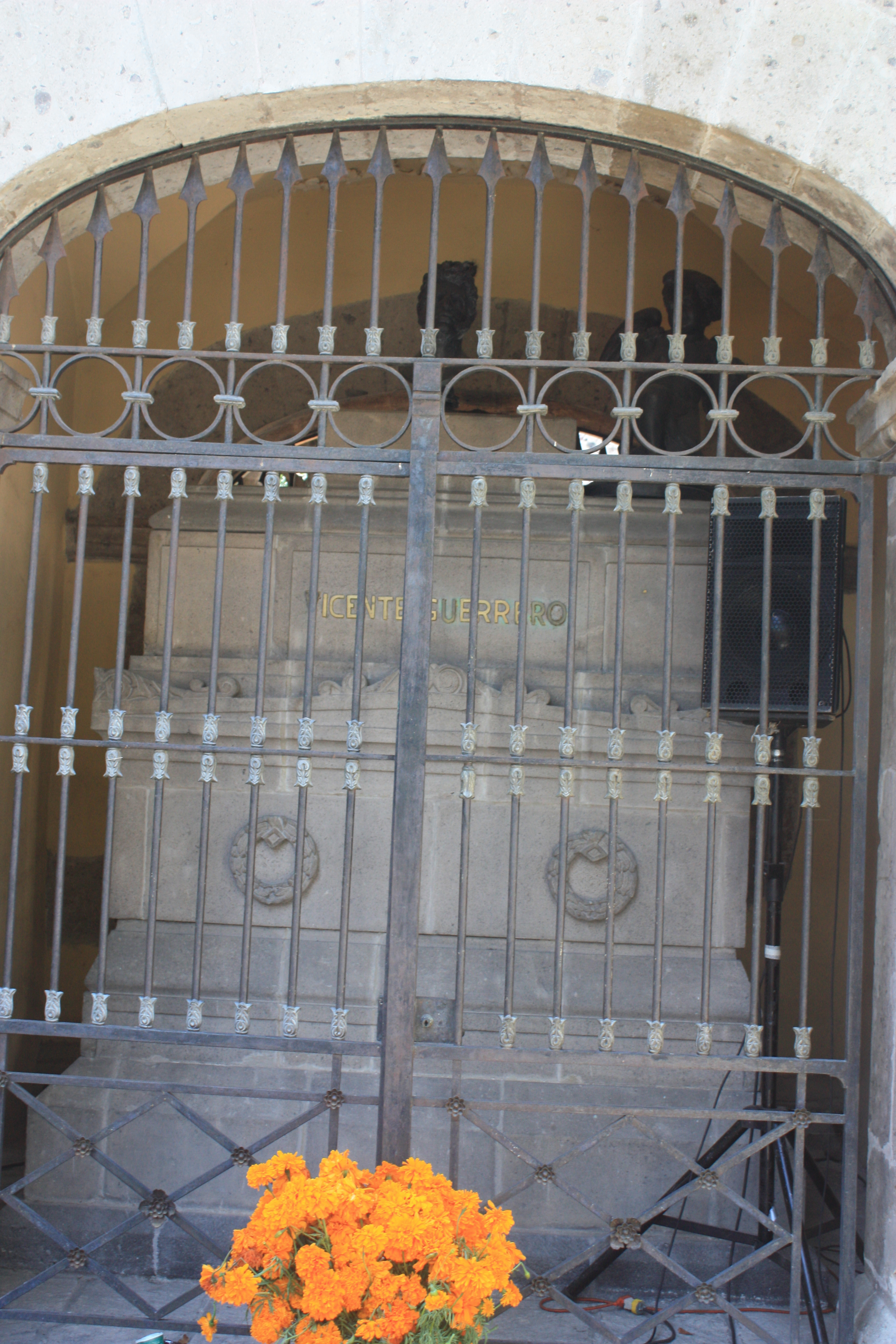 Panteón de los Hombres Ilustres